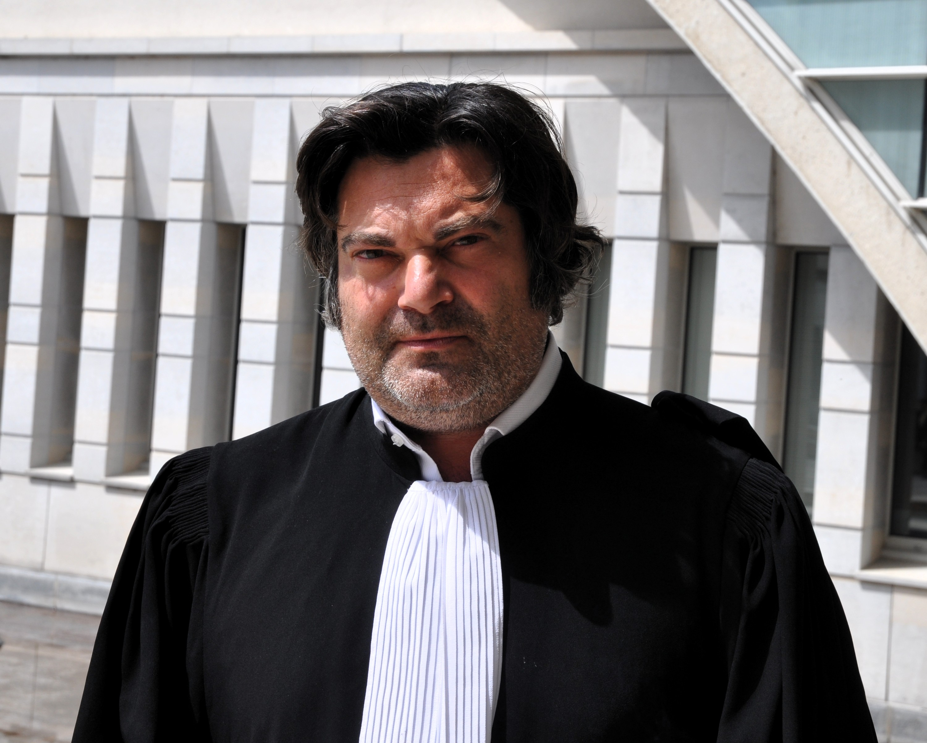 L'avocat Randall Schwerdorffer, ici au tribunal de grande instance de Besançon.